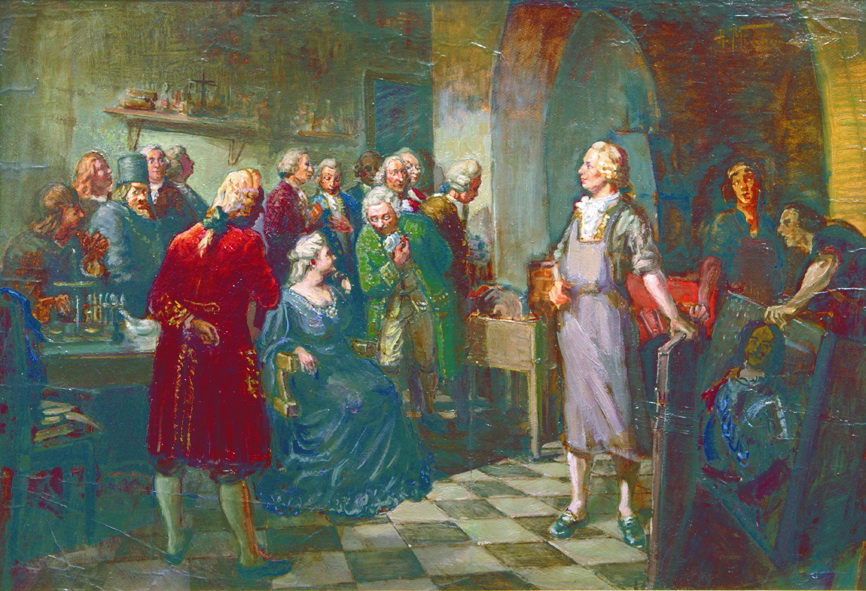 А.В.Маковский «Посещение императрицей Елизаветой Петровной мастерской Ломоносова»